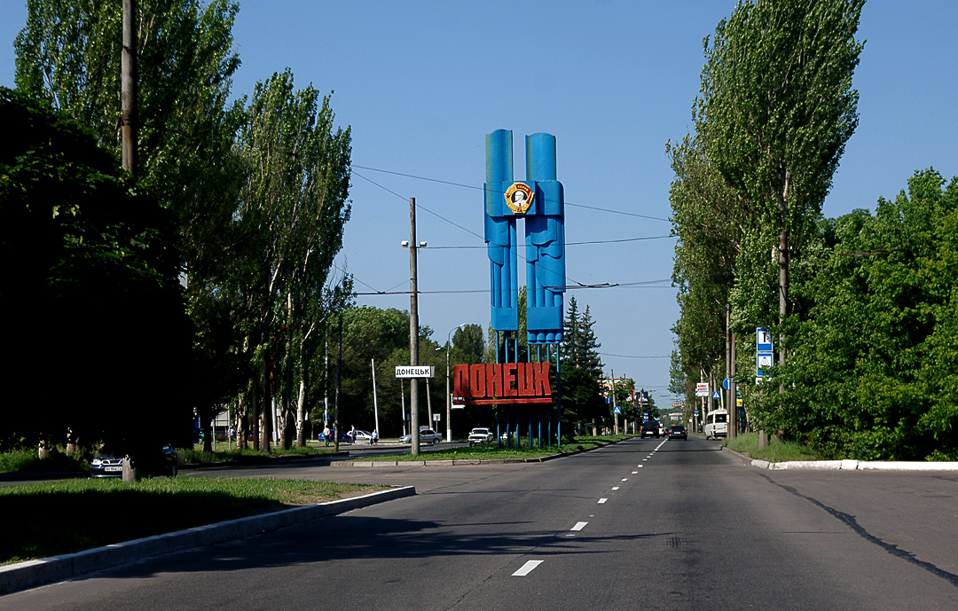 Граница между Макеевкой и Донецком